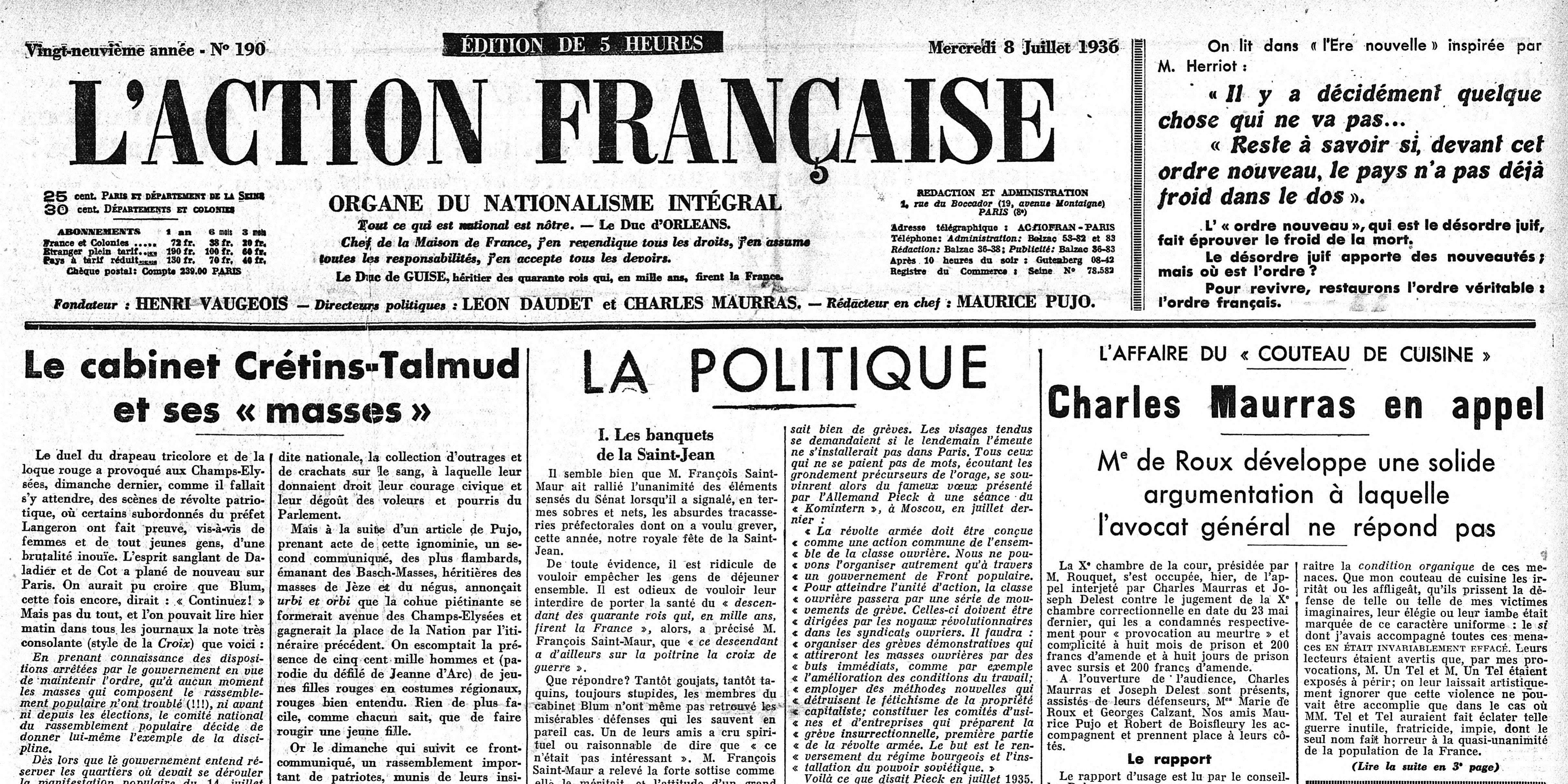 L'Action française, une du 8 juillet 1936.